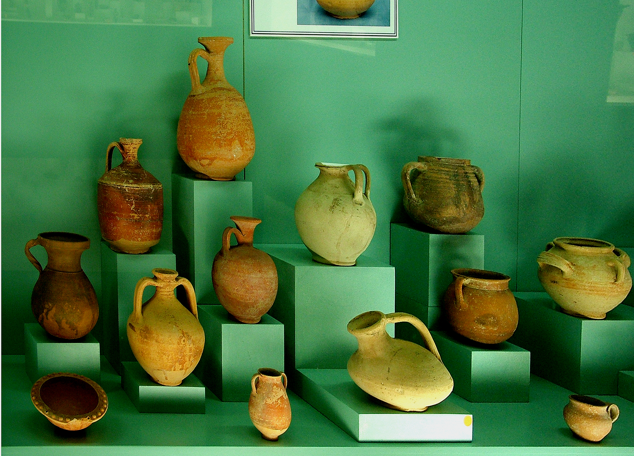 Neolitkori kerámiák (Régészeti Múzeum, Antalya, Törökország)